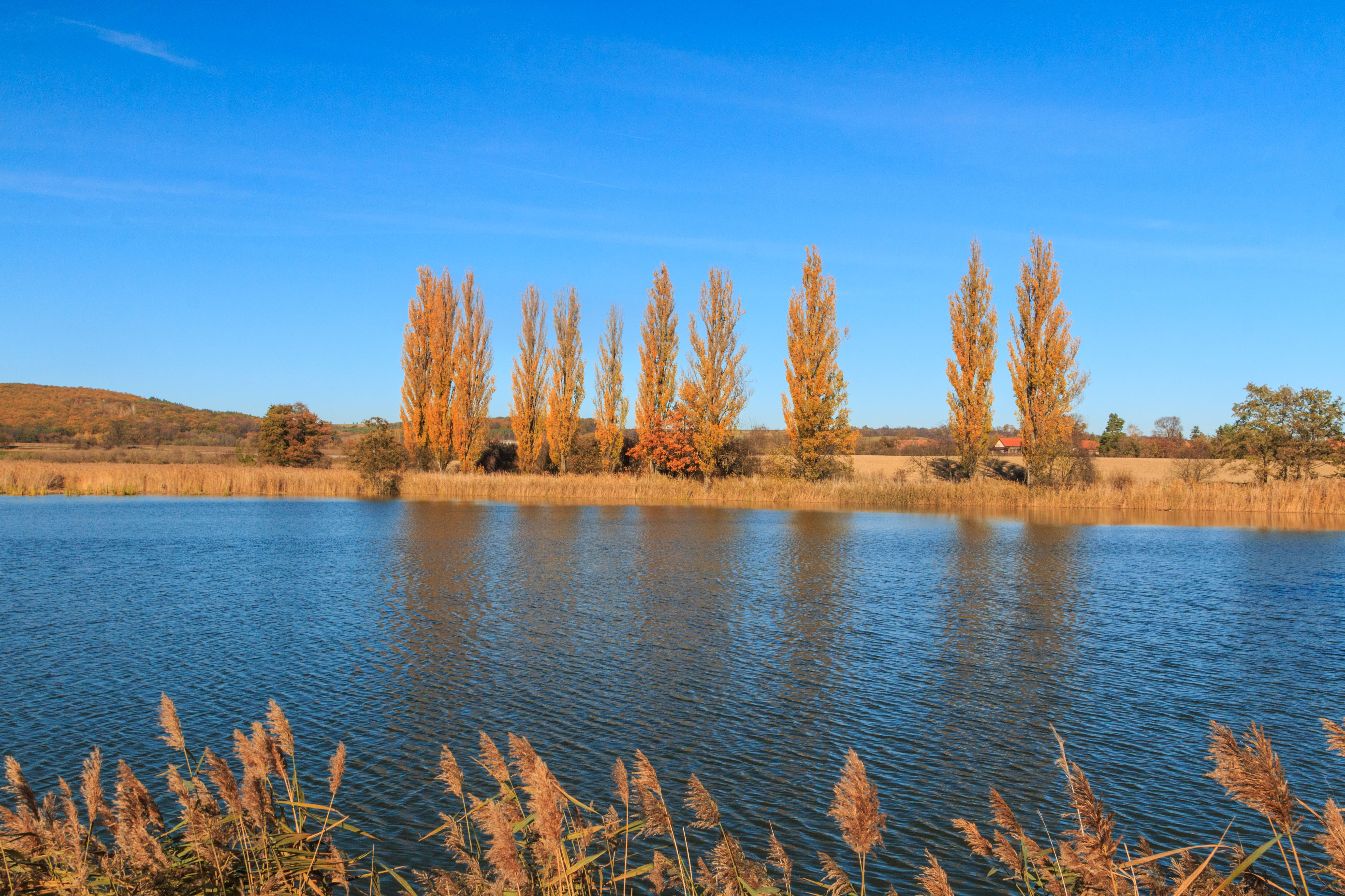 Čejkův rybník u Dětenic